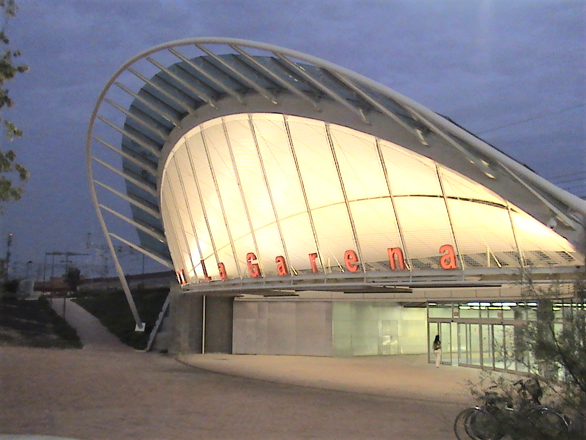 Entrada a la Estación de trenes La Garena, en Alcalá de Henares (Comunidad de Madrid - España) inaugurada el 22 de mayo de 2004.